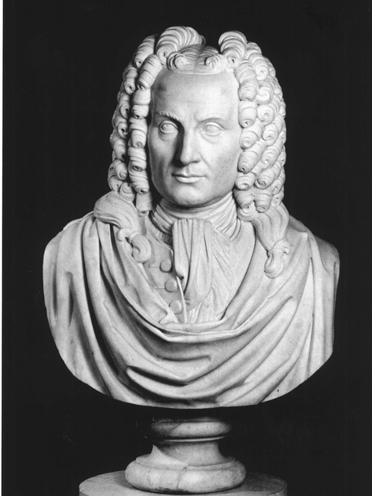 Busto di Benedetto Marcello, opera di Gaetano Zennaro precedente al 1847. Il busto fa parte del Panteon Veneto, conservato presso Palazzo Loredan di Campo Santo Stefano a Venezia.